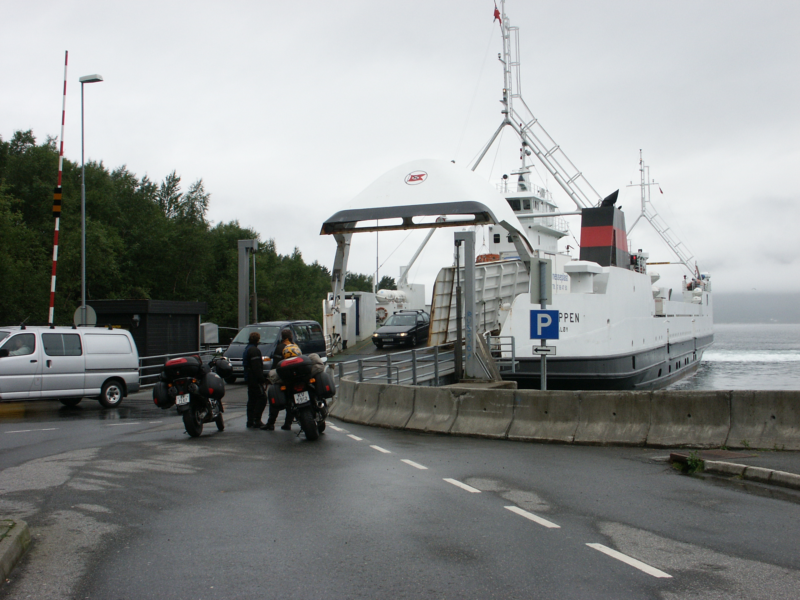 MF Gloppen ved Oppedal kai (Oppedal-Lavik i Sogn)